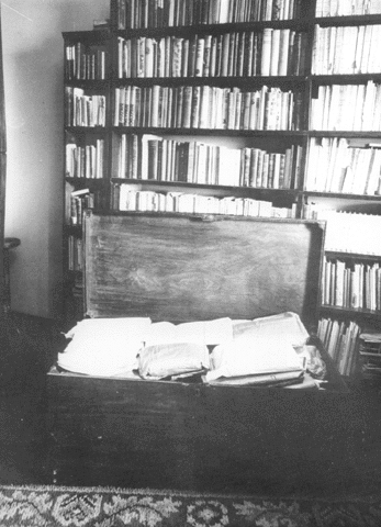 Arca onde pousavam cadernos de Fernando Pessoa